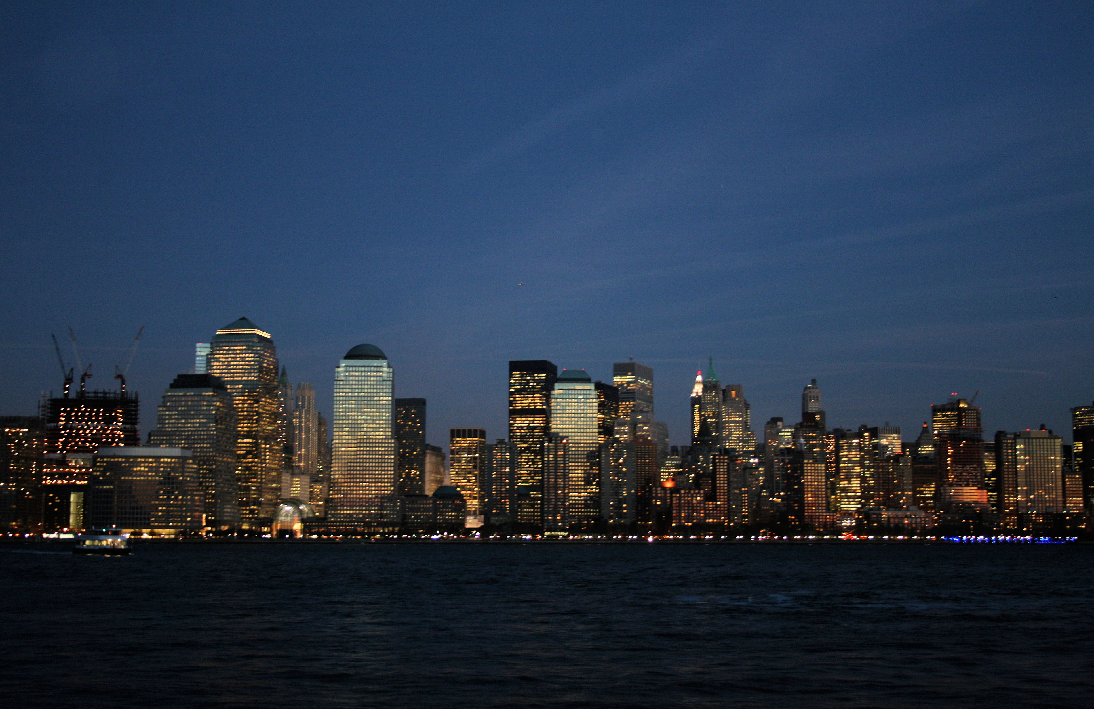 Manhattan Skyline, NY, US